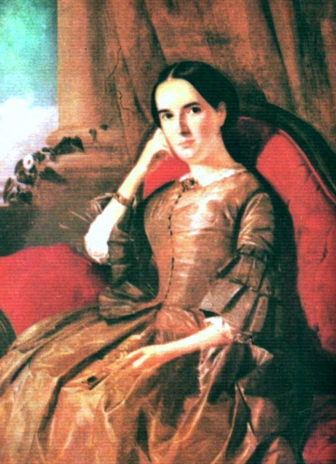 Anita Tovar de Zuluaga. Oleo/tela. Coleccion Herederos de doña Maria Zuluaga de Machado. Caracas.